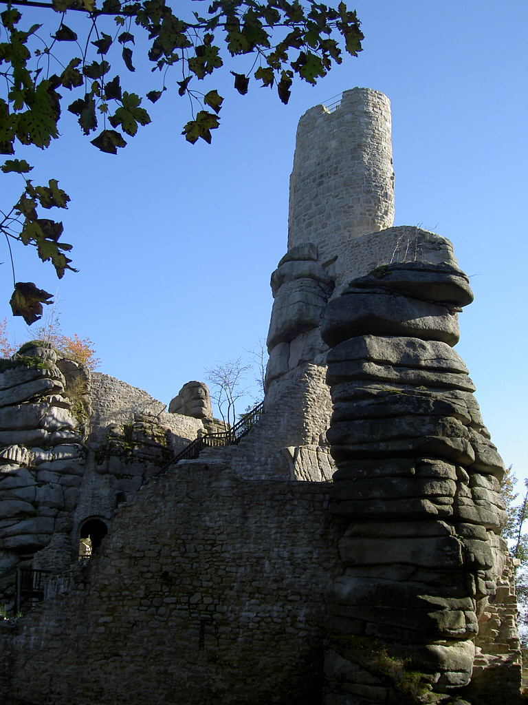 Ruine Weißenstein im Steinwald